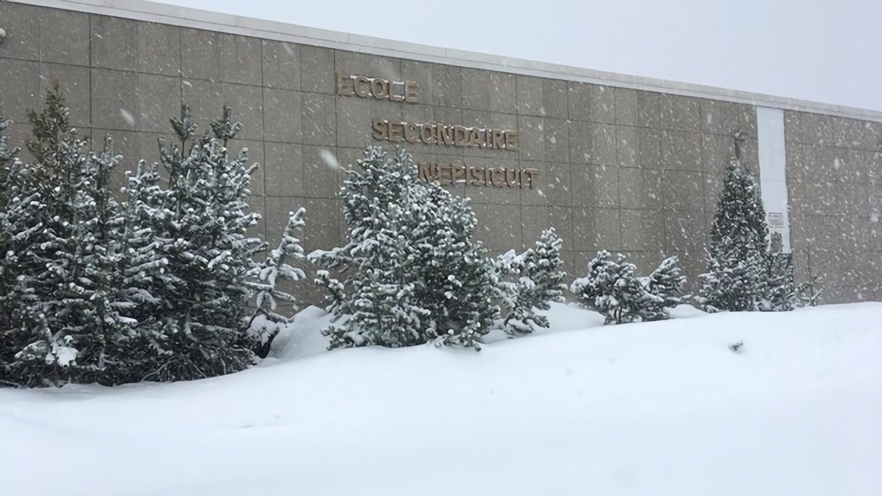 Le devant de l'École secondaire Népisiguit.